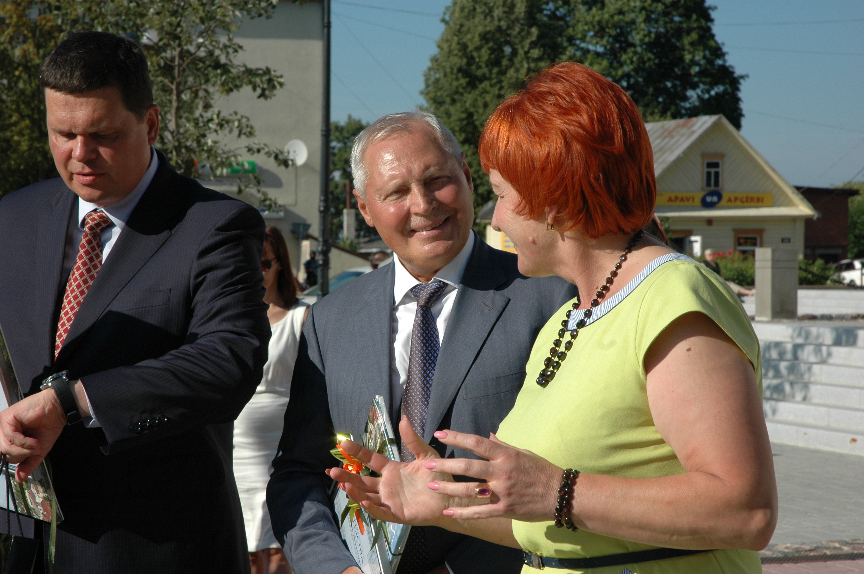 Открытие солнечных часов